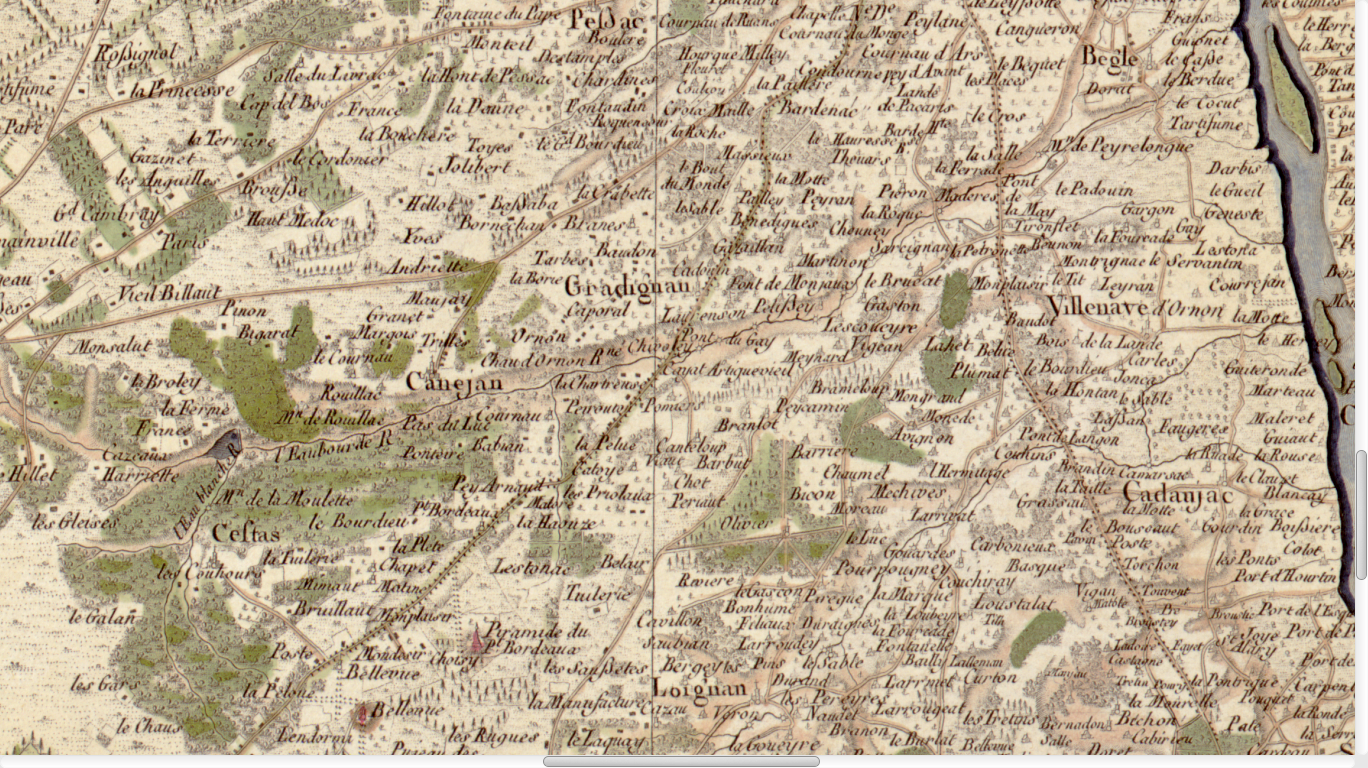 Carte de Cassini n°104 (Gironde, zoom sur L'Eau Bourde), 1756.